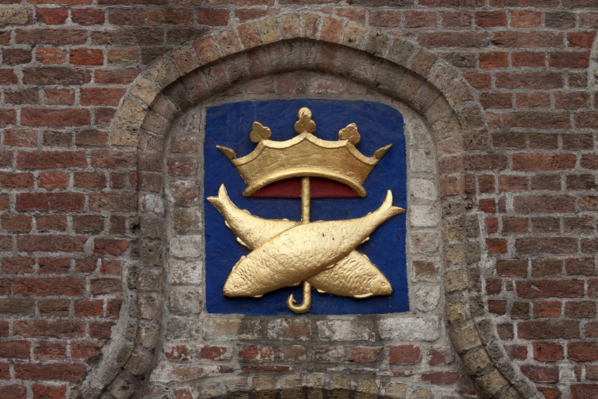 Stadsontvangstkantoor Stadsassyse, Huidenvettersplein 13, Brugge